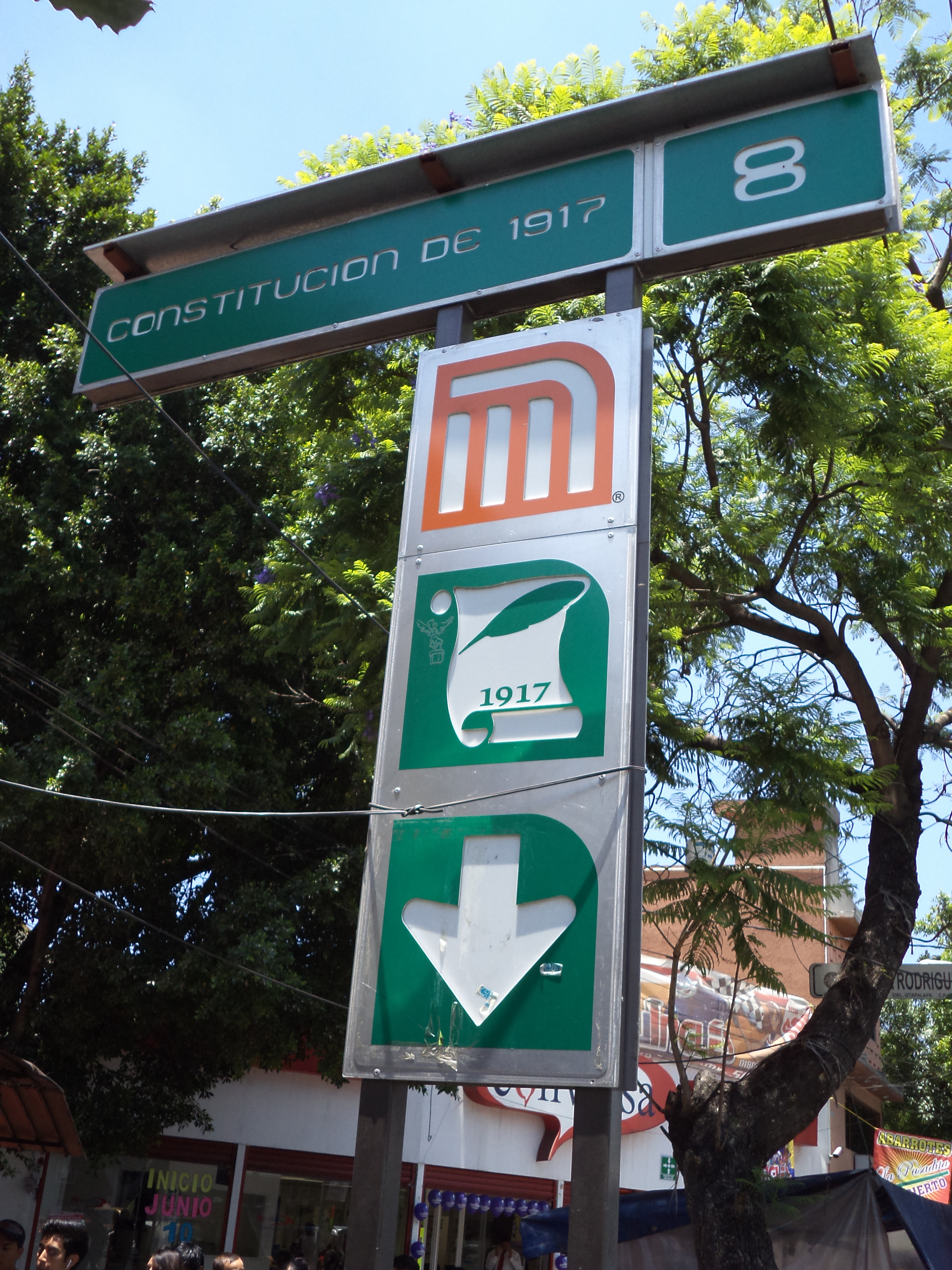 Estela estacion constitucion 1917